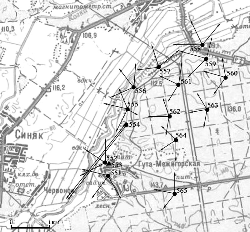 Схема БРО 22 Київського укріпленого району, викладена у вільний доступ авторами книги "Киевский укрепленный район 1928—1941" (